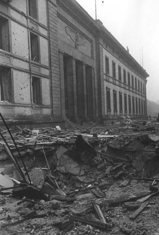 Brit. Luftangriff auf Berlin, Nacht zum 29.1.44 Blick auf die durch eine Sprengbombe beschädigte Reichskanzlei, im Vordergrund der Bombenkrater. Foto: Hamann/Transocean-Europapress (G) 1.2.44